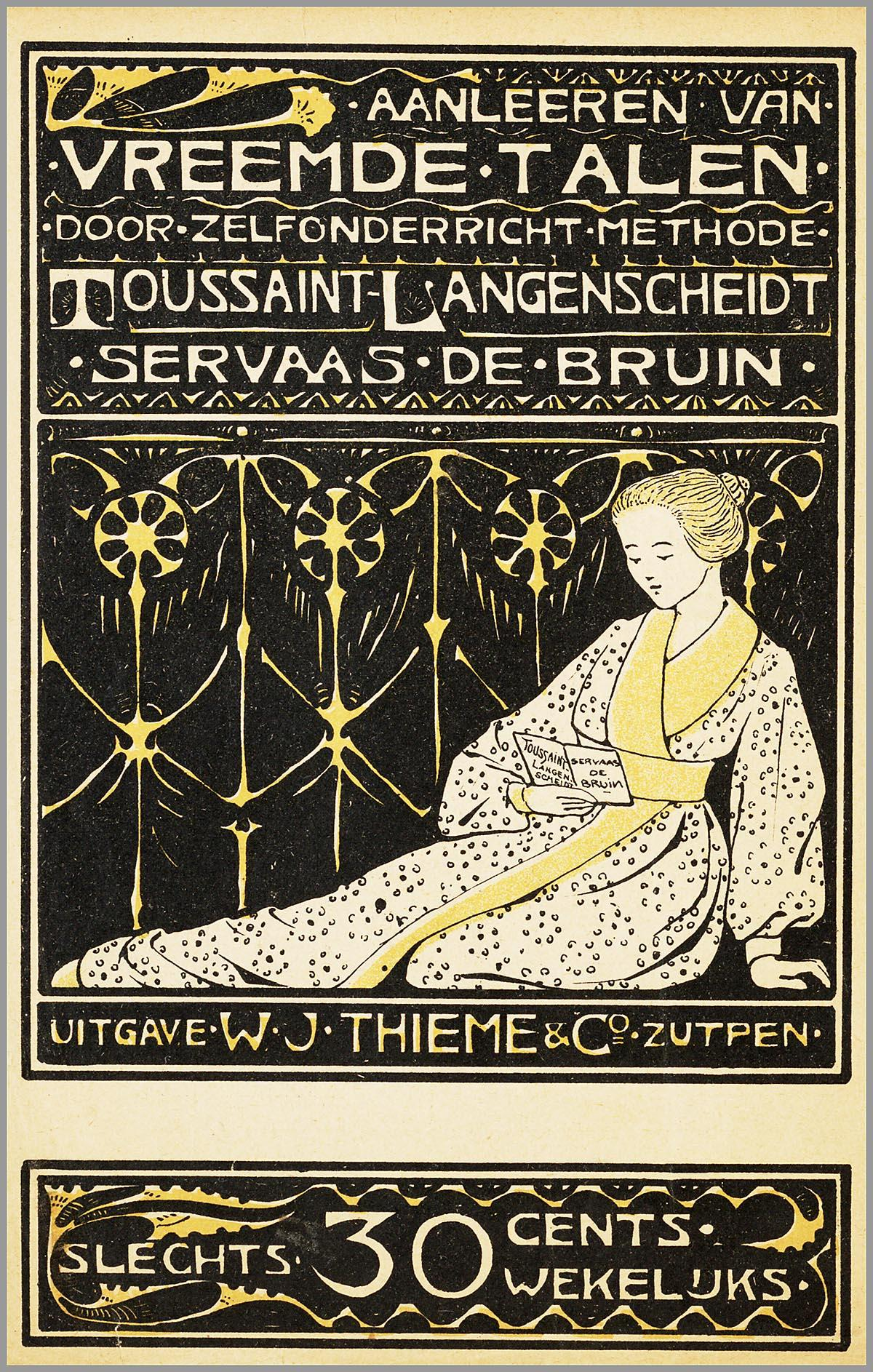 Klein drukwerk: Aanleeren van vreemde talen door zelfonderricht methode. Toussaint Langenscheidt. Servaas de Bruin. Slechts 30 cents wekelijks.